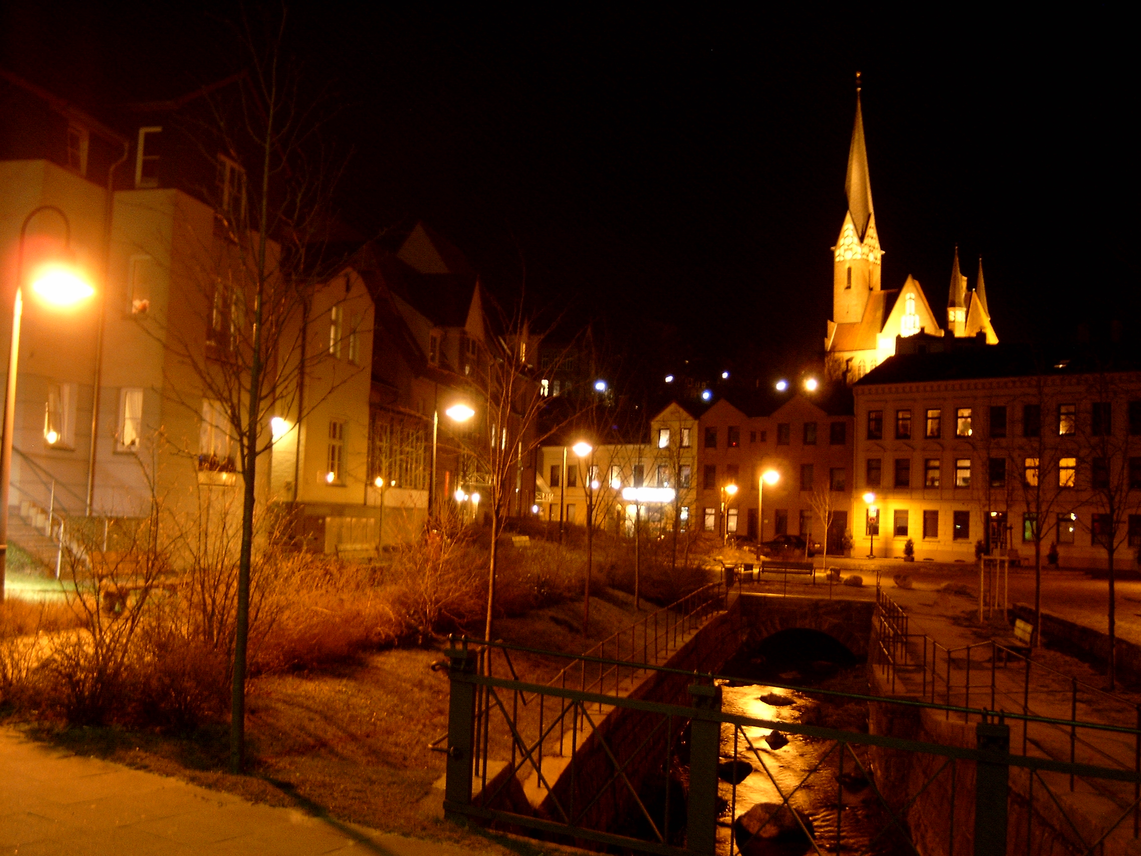 Am Flensburger Lautrupsbach - Im Hintergrund die St. Jürgens Kirche